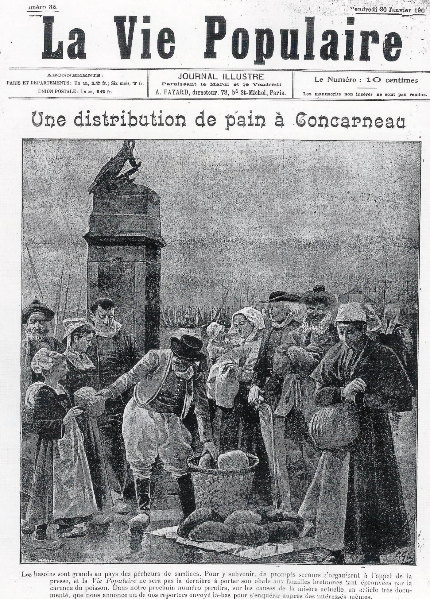 Distribution de pain à Concarneau lors de la crise de la sardine (dessin daté du 30 janvier 1903)